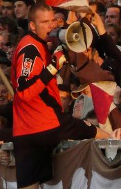 Benedikt Pliquett